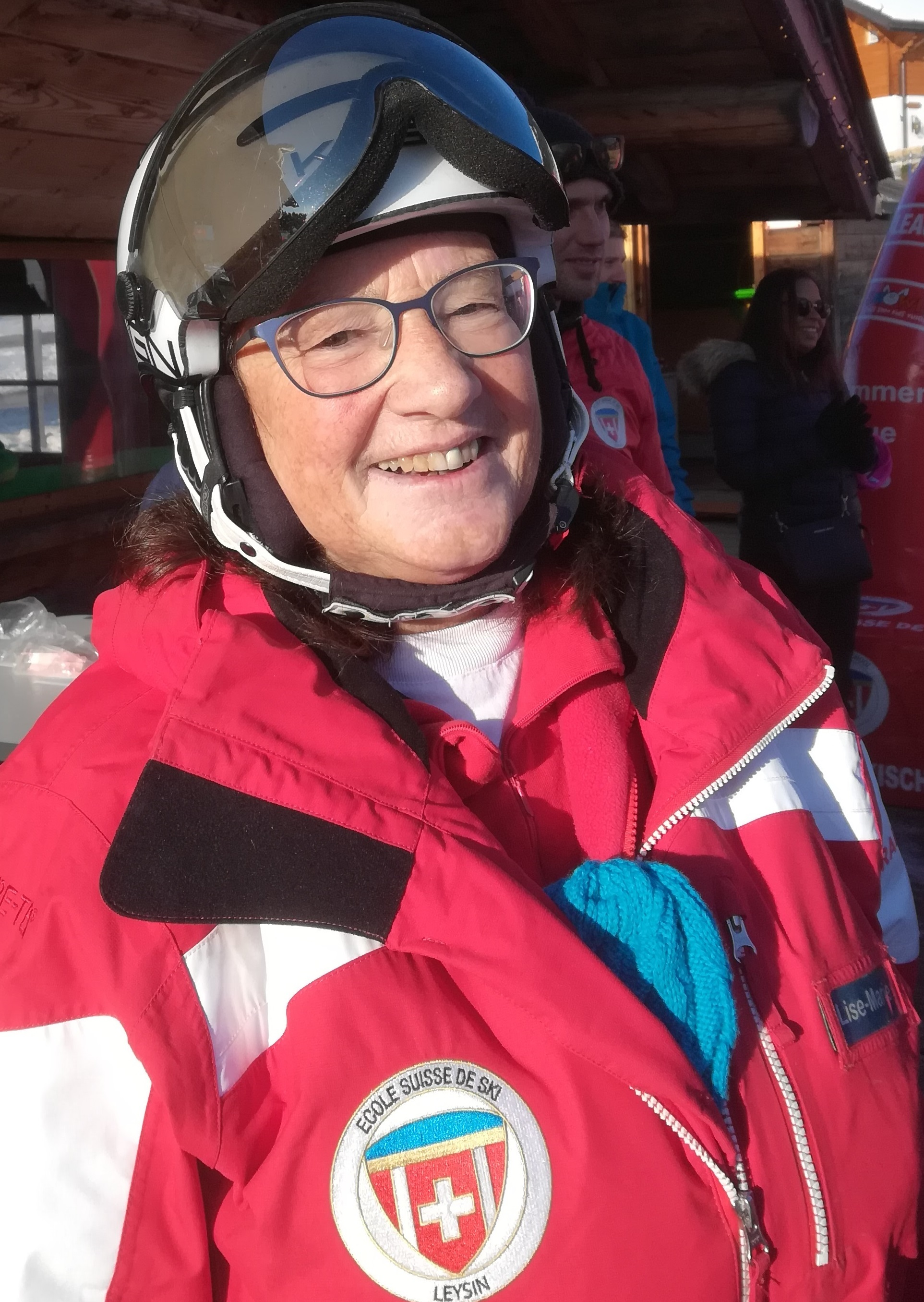 Lise-Marie, au Parc des neiges pour enfants de Leysin.